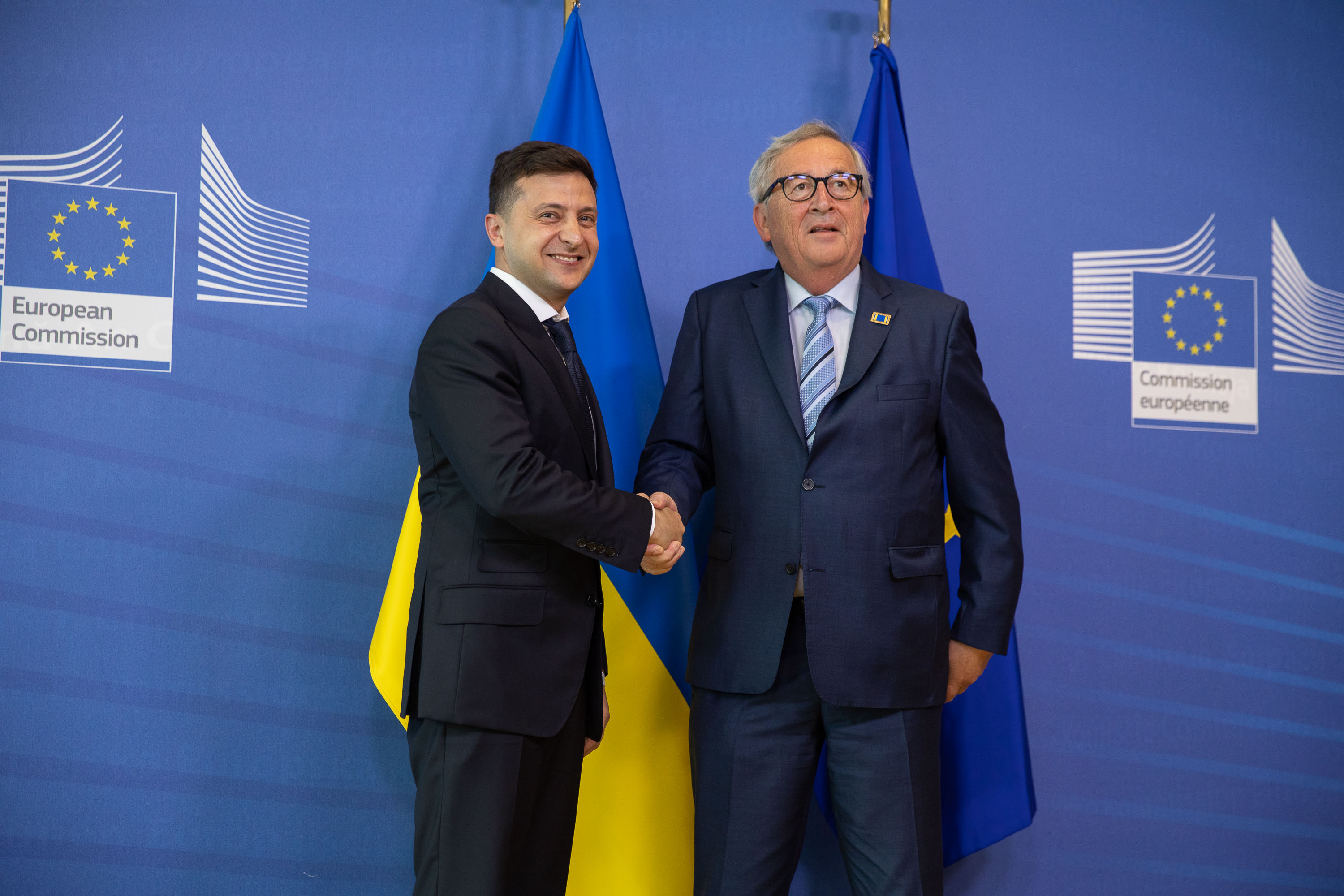 Визит Президента Украины в институты ЕС и НАТО в Брюсселе